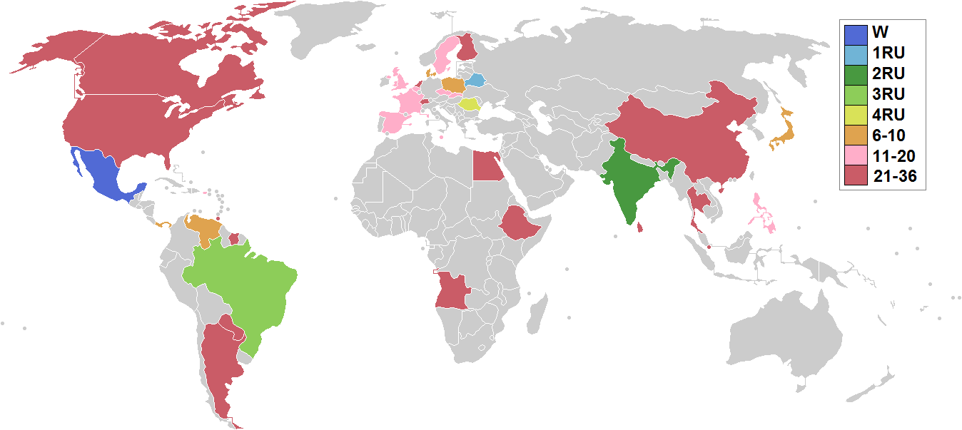 Państwa i terytoria zależne uczestniczące w konkursie Mister Supranational 2016